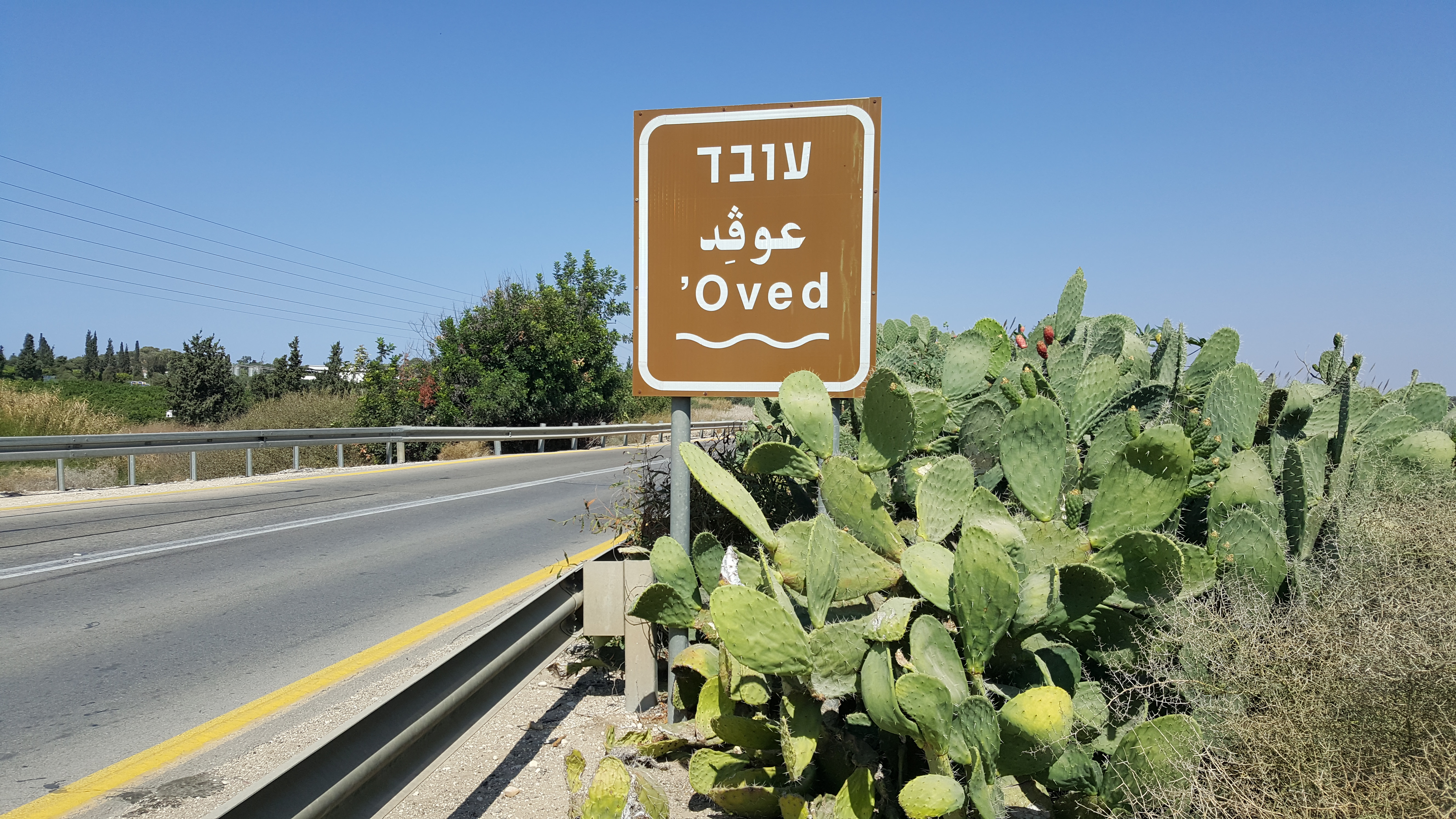 מגדל המים בקיבוץ יד מרדכי